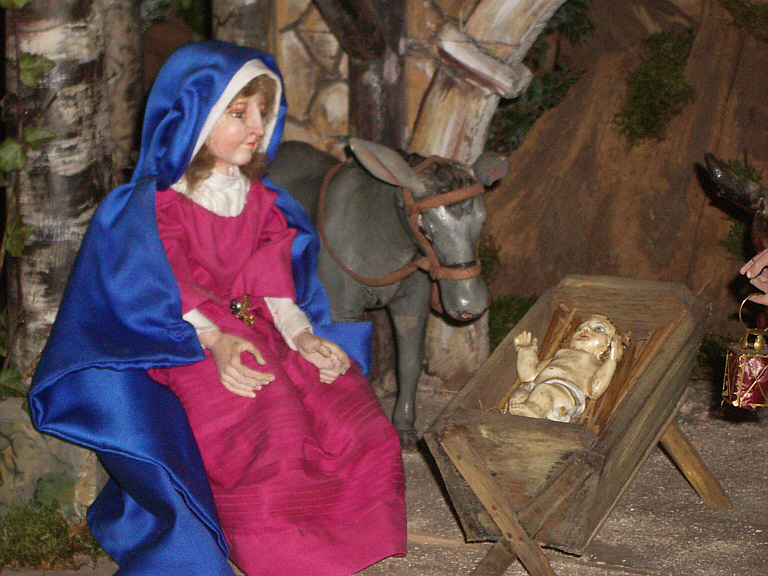 Balzhausen, Leonhardskapelle, Krippe